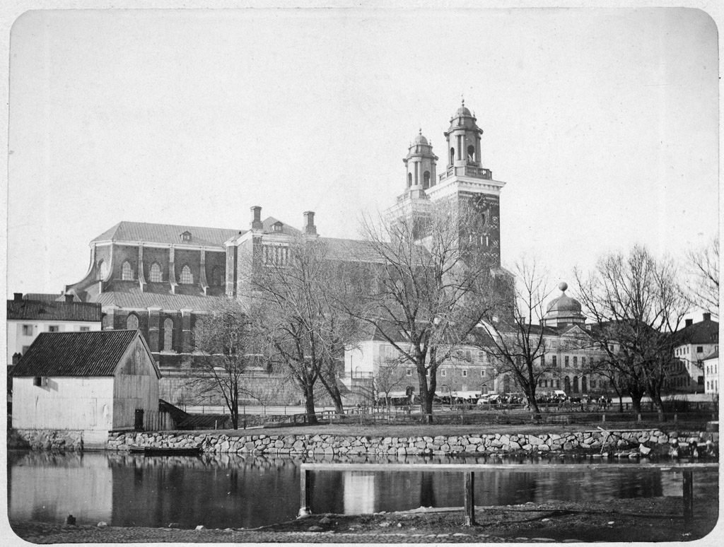 Uppsala Cathedral as it looked from the 1740s to the 1880s, before the restauration by Helgo Zettervall. The cathedral, which is the largest Gothic church in Scandinavia, with its roots in 1273, was inaugurated in 1435. Fyris River running by. Uppsala domkyrka som den såg ut från 1740-talet till 1880-talet, före Helgo Zettervalls restaurering. Domkyrkan, som är Skandinaviens största gotiska kyrka, med rötter från 1273, invigdes 1435. Fyrisån flyter förbi. Parish (socken): Uppsala Province (landskap): Uppland Municipality (kommun): Uppsala County (län): Uppsala Photograph by: Emma Schenson Date: 1860s Format: Print Persistent URL: Read more about the photo database (in english)